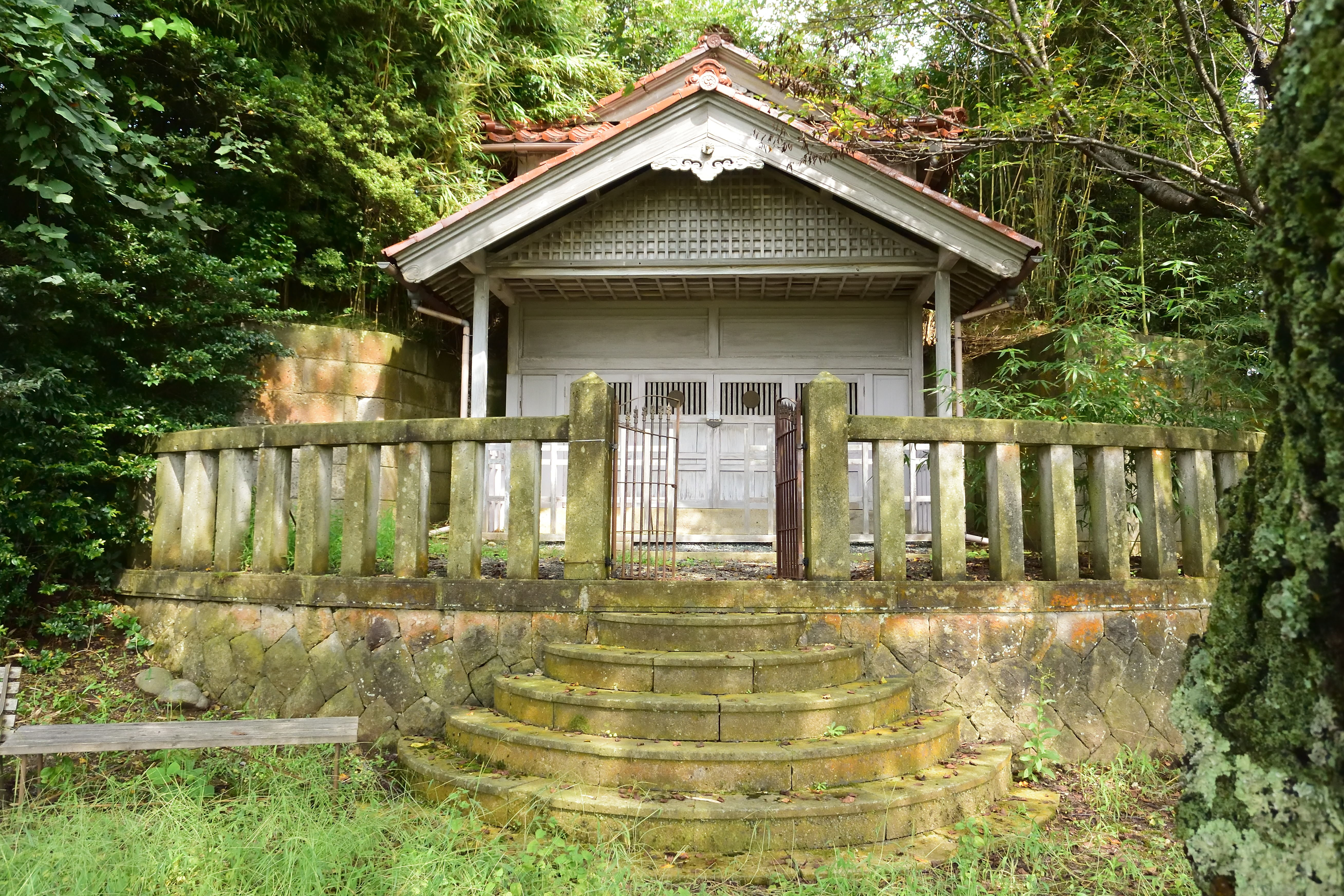 狐山古墳覆屋